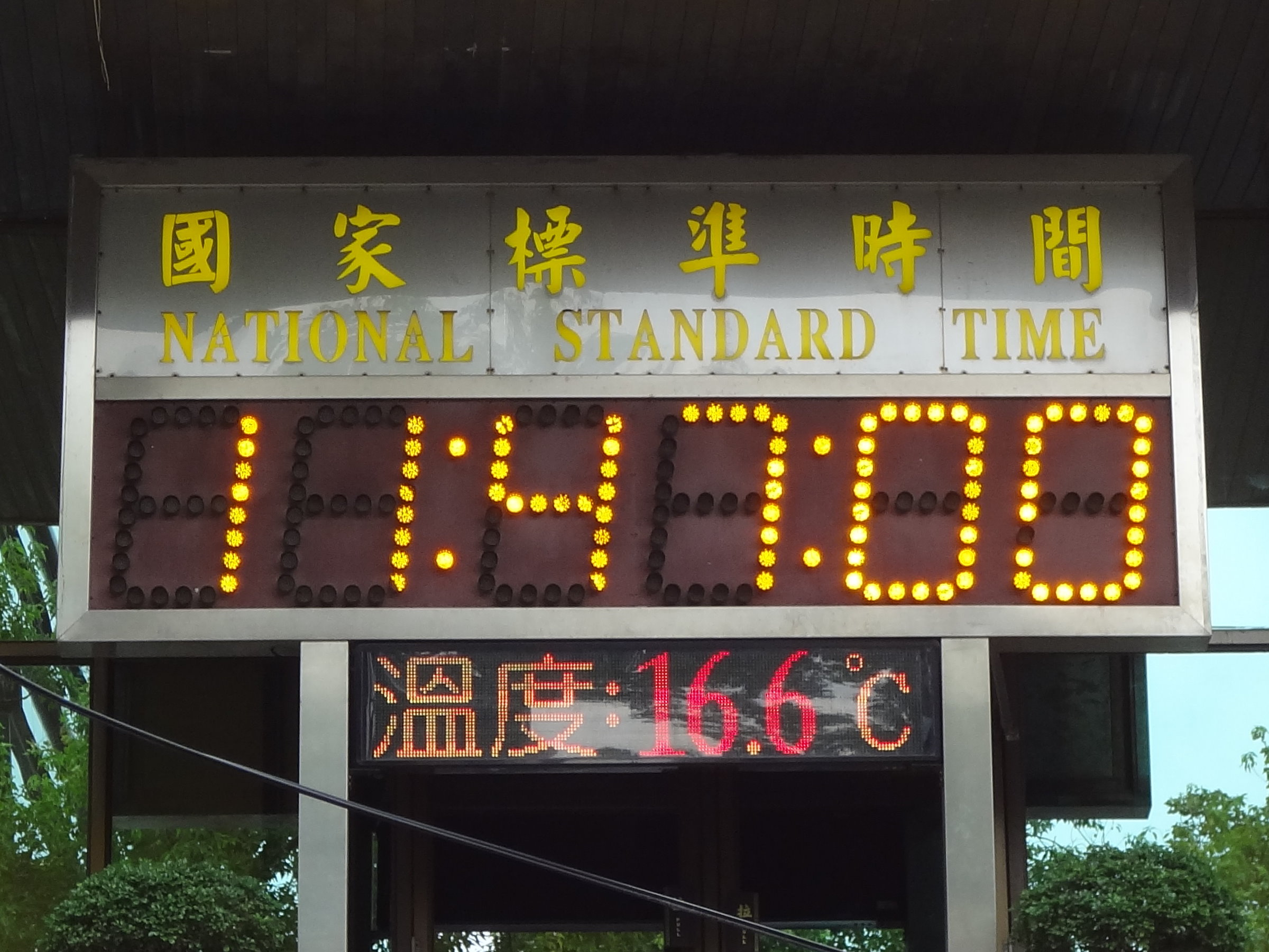 中文（台灣）: 臺北市中正區濟南路一段，中華民國經濟部標準檢驗局總局外牆上的國家標準時間數字鐘。